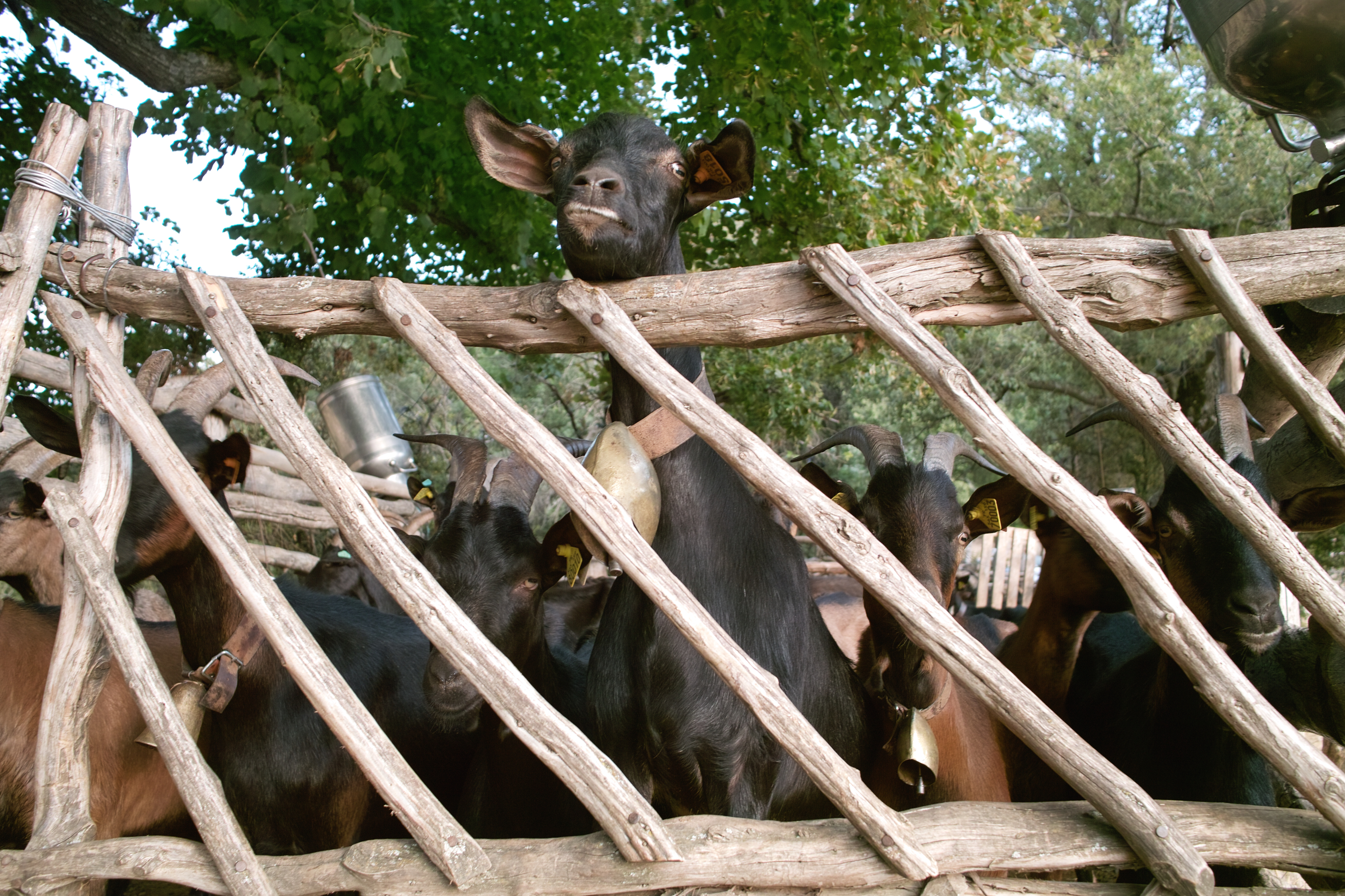 Chèvres à l'enclos dans le Grand Luberon